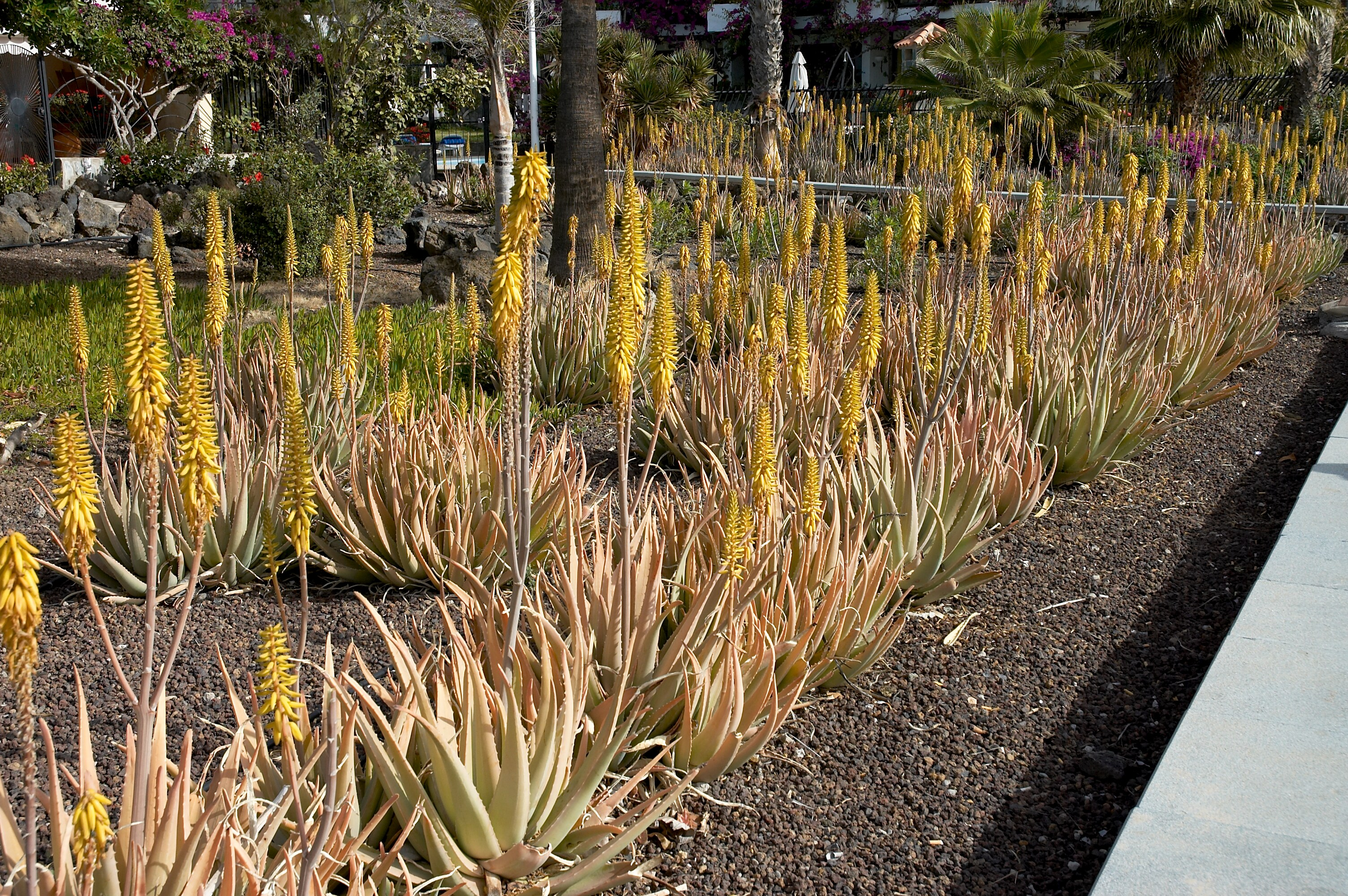 Aloe vera in Playa del Inglés, Gran Canaria, Spain